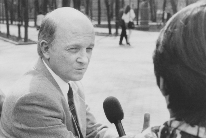 Oazu Nantoi - Moldovan political analyst.